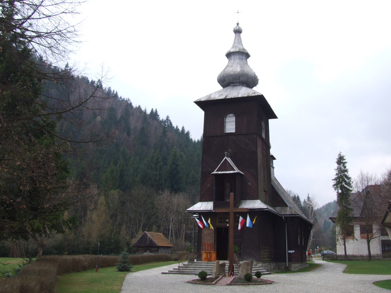 Stary kościół w Szczawie. Kościół Najświętszego Serca Jezusa. Wybudowany w latach: 1958–1959, autor projektu: Aleksander Podgórny.